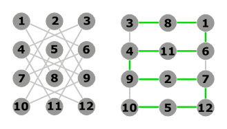 description : à gauche, le graphe de mouvement du cavalier sur un échiquier de 3 sur 4 ; à droite, le même graphe réorganisé. date : août 2005 remarque : document au format SVG est disponible sur demande. fait par moi même ~ þaצo ♫ août 2005 à 14:33 (CEST)